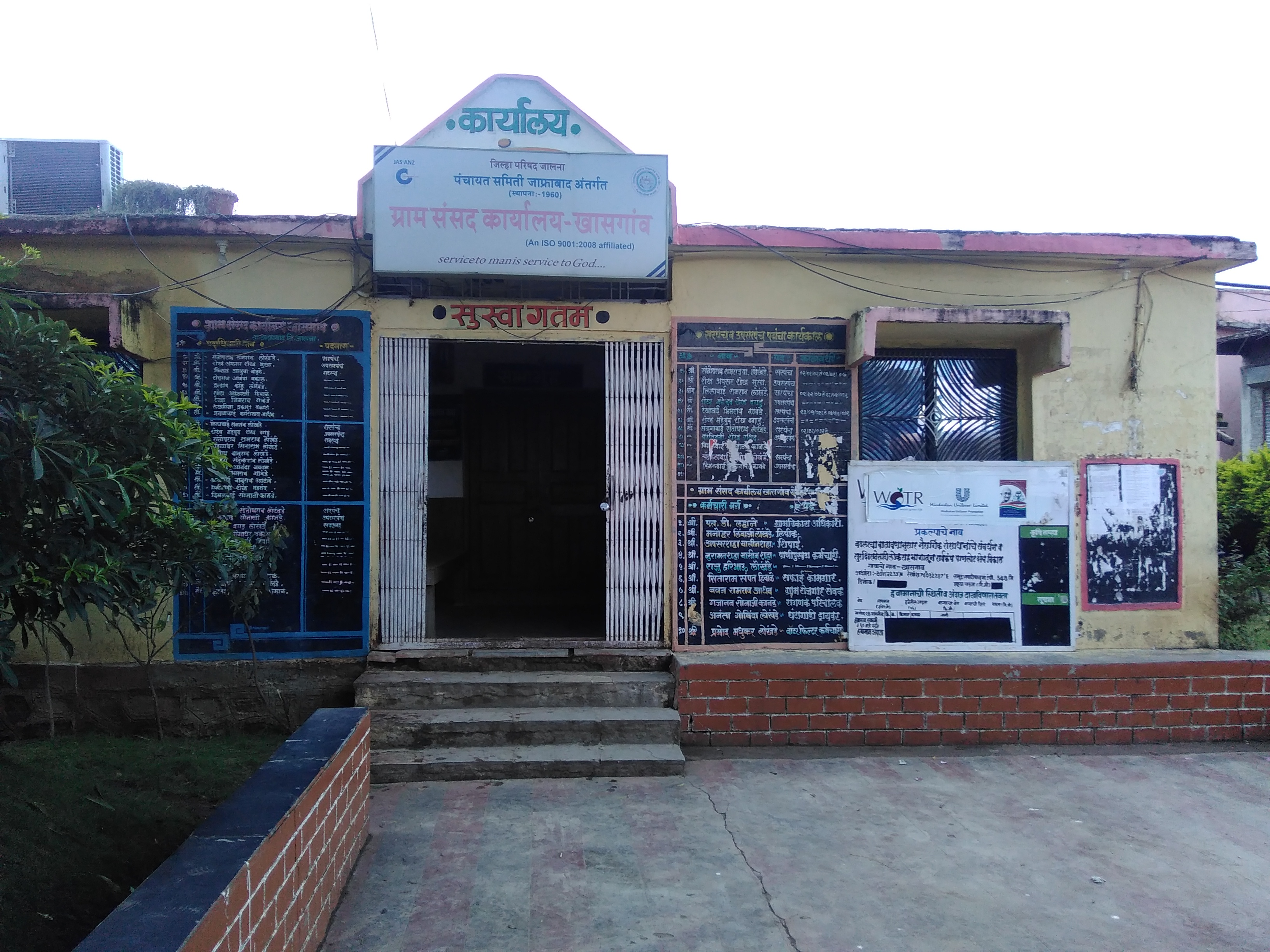 खासगाव‍‍‍‍ची ग्रामपंचायत